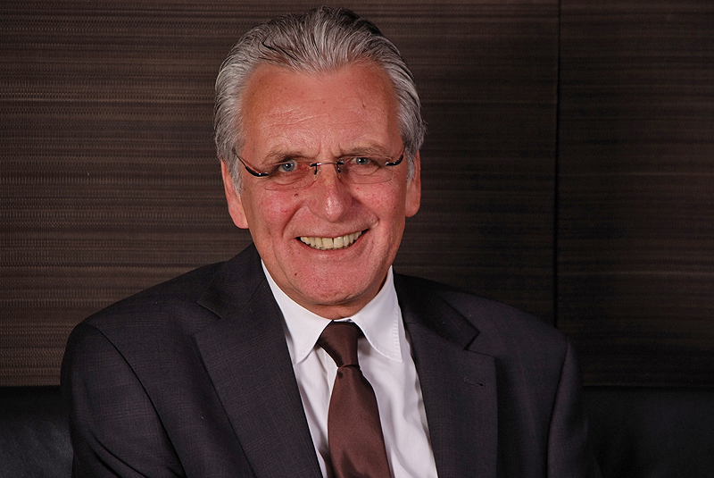 Uwe Biester, Landtagsabgeordneter Niedersachsen, 16. Wahlperiode (Fotoprojekt Landtagsabgeordnete Niedersachsen am 24. und 25. November 2009)